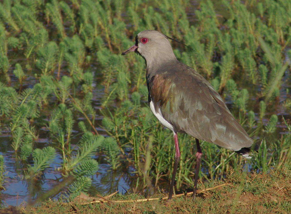 Vanellus chilensis